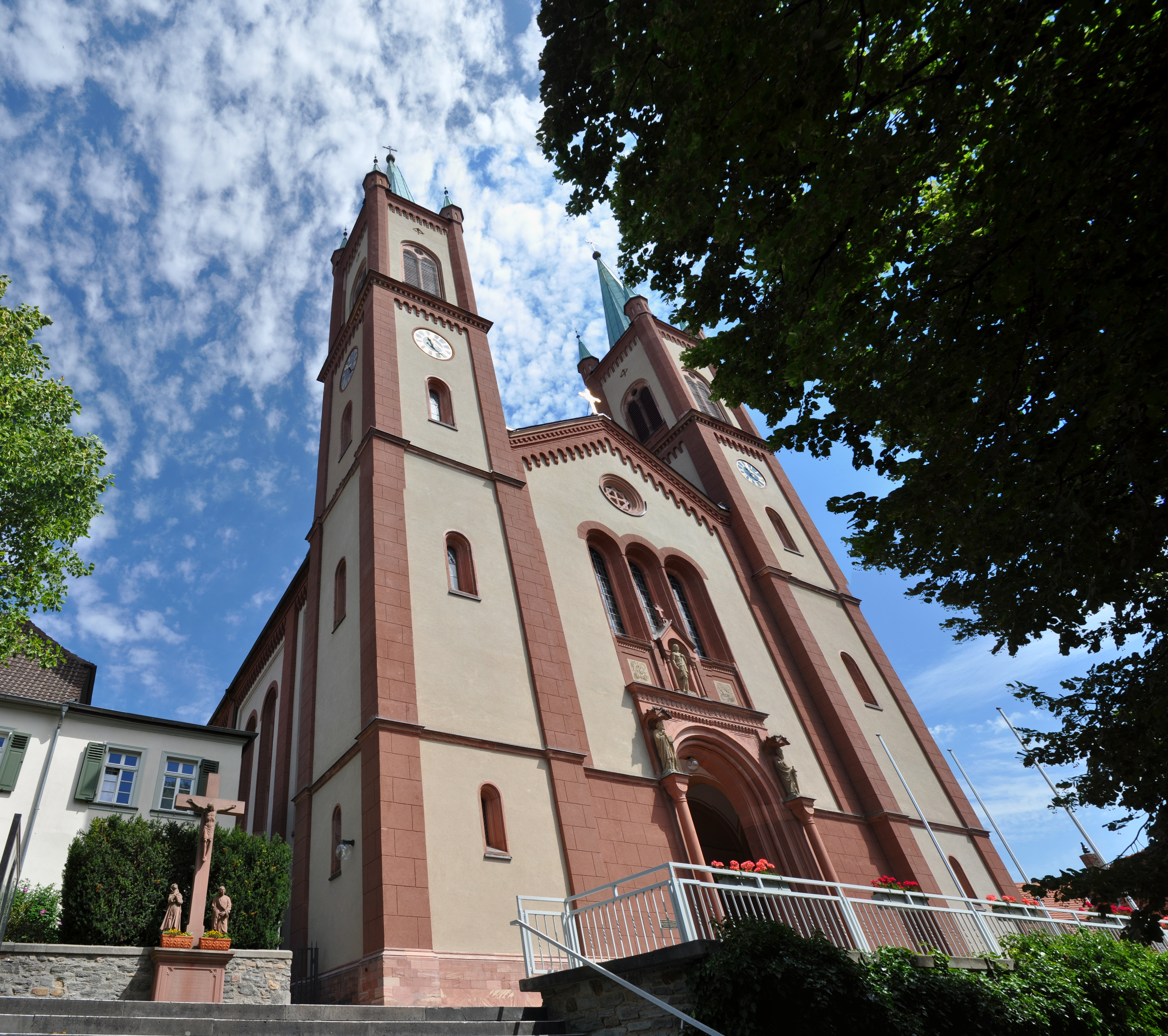 Taunusdom in Kirdorf. Das Bild ist eine zusammengesetzte Panoramaaufnahme aus 6 Einzelaufnahmen.